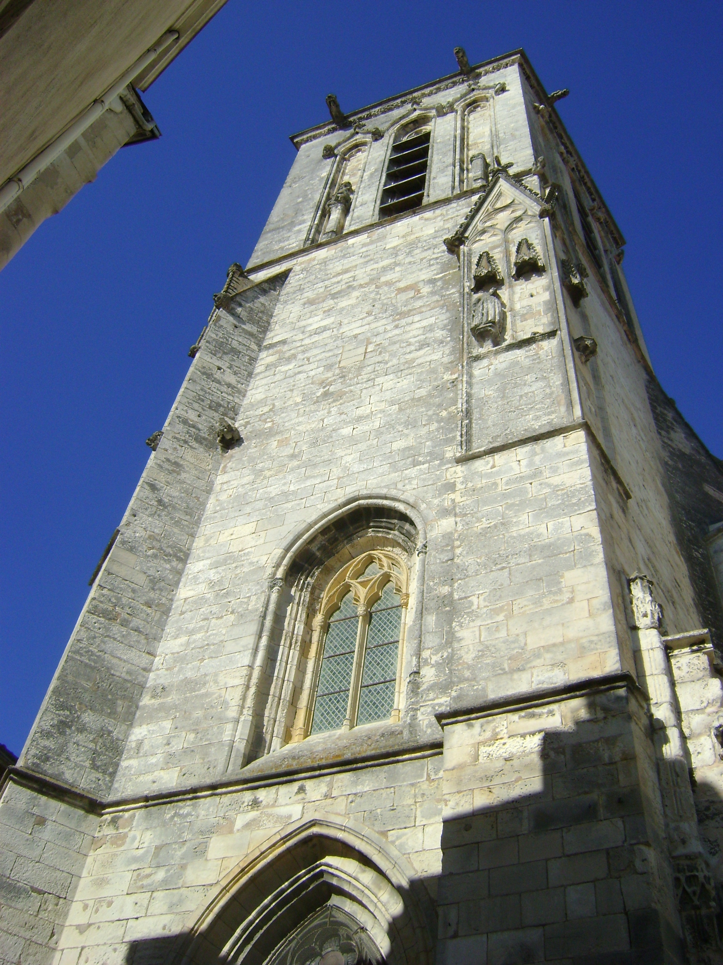 Eglise Saint-Sauveur de la Rochelle.